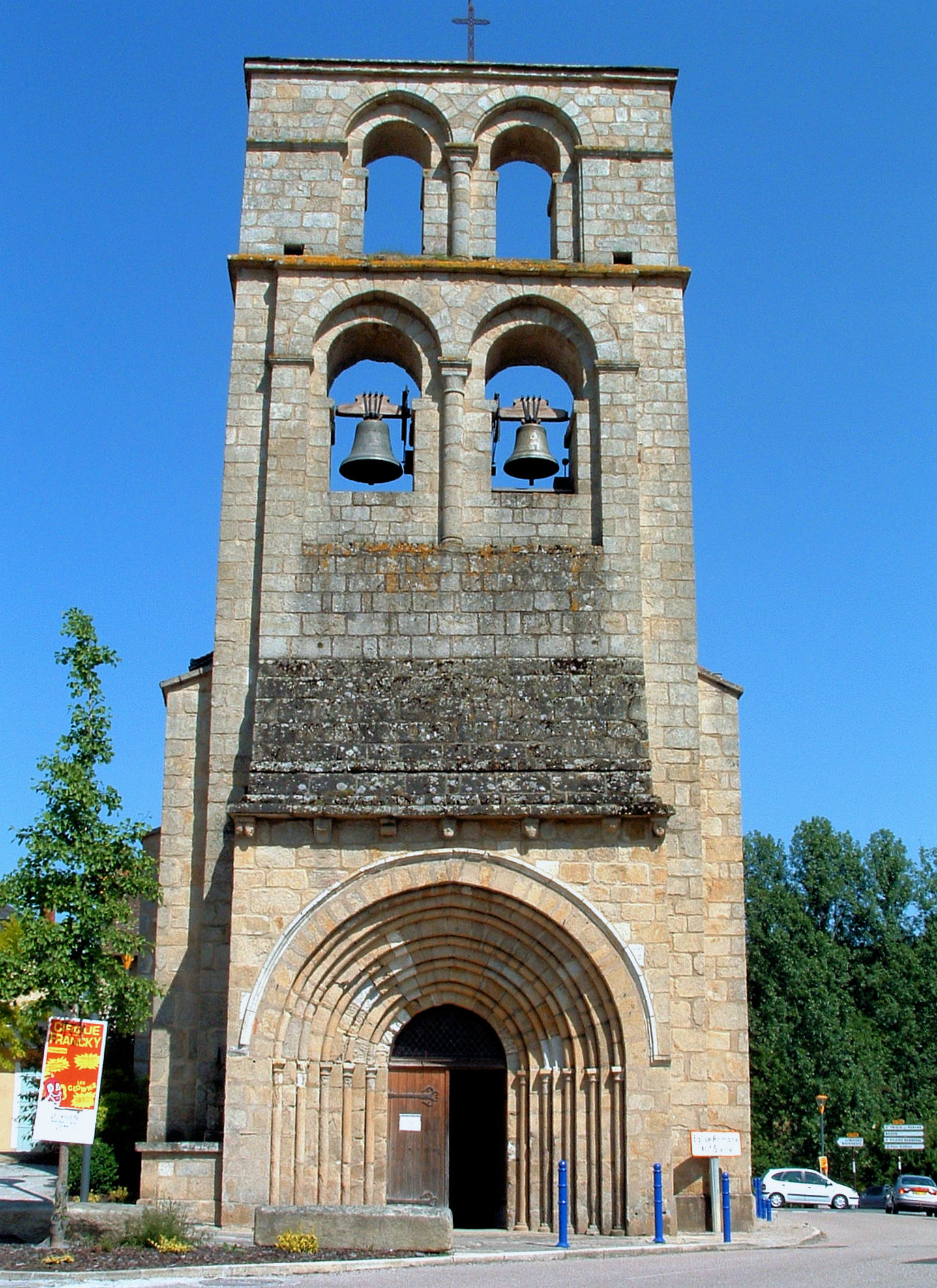 Le Vigen - Eglise Saint-Mathurin - Façade